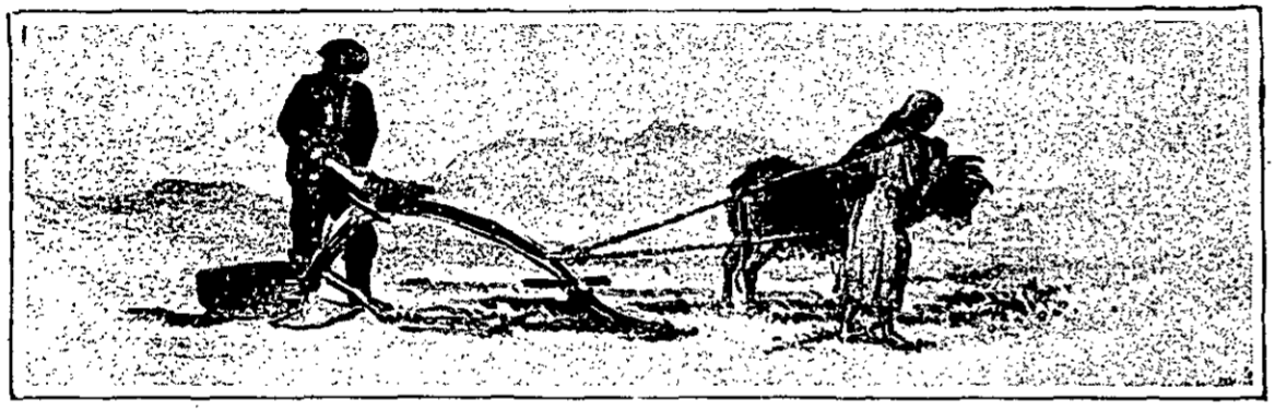 Crann-nan-gad plough